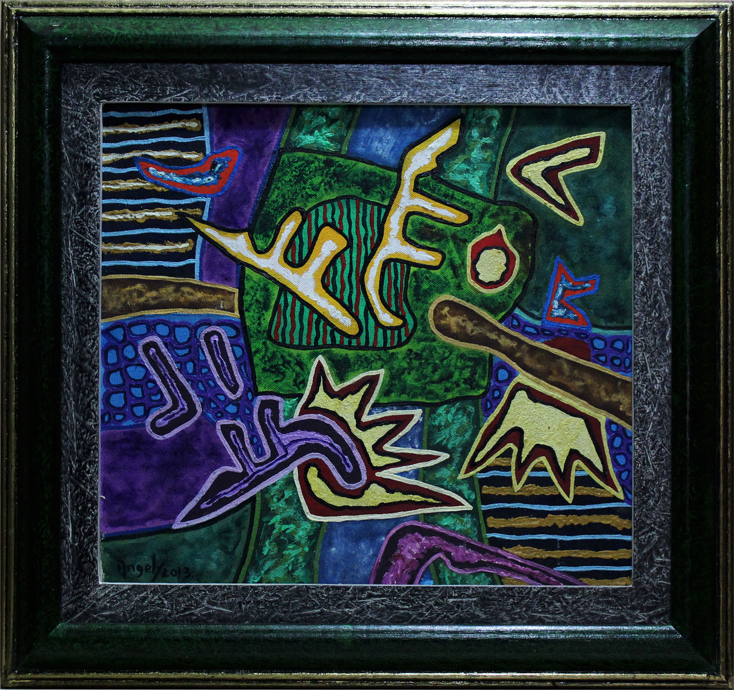 Pintura, Oleo sobre lienzo, 37 x 31 cms, composición zoo morfa con características solares.